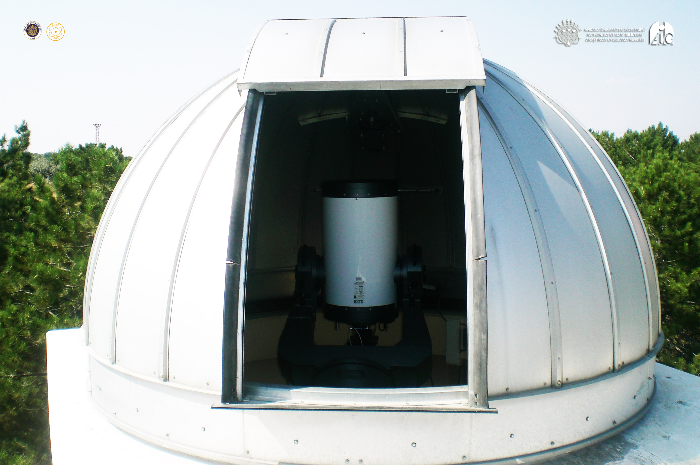 AUG T40 Kreiken Teleskobu